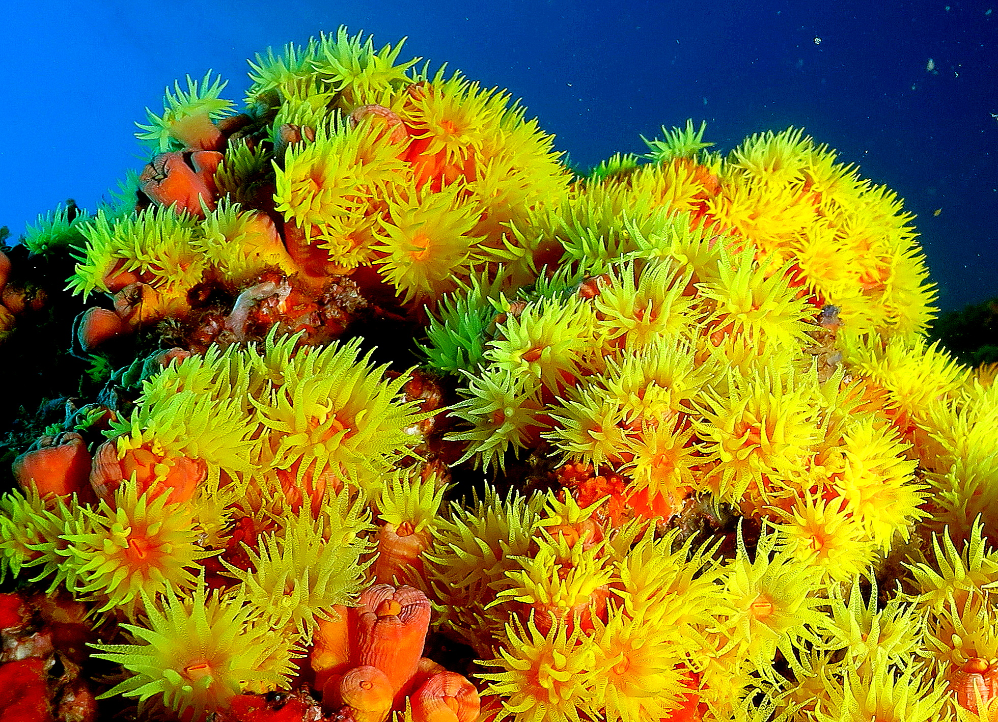 Coral Sol (Tubastraea coccinea)